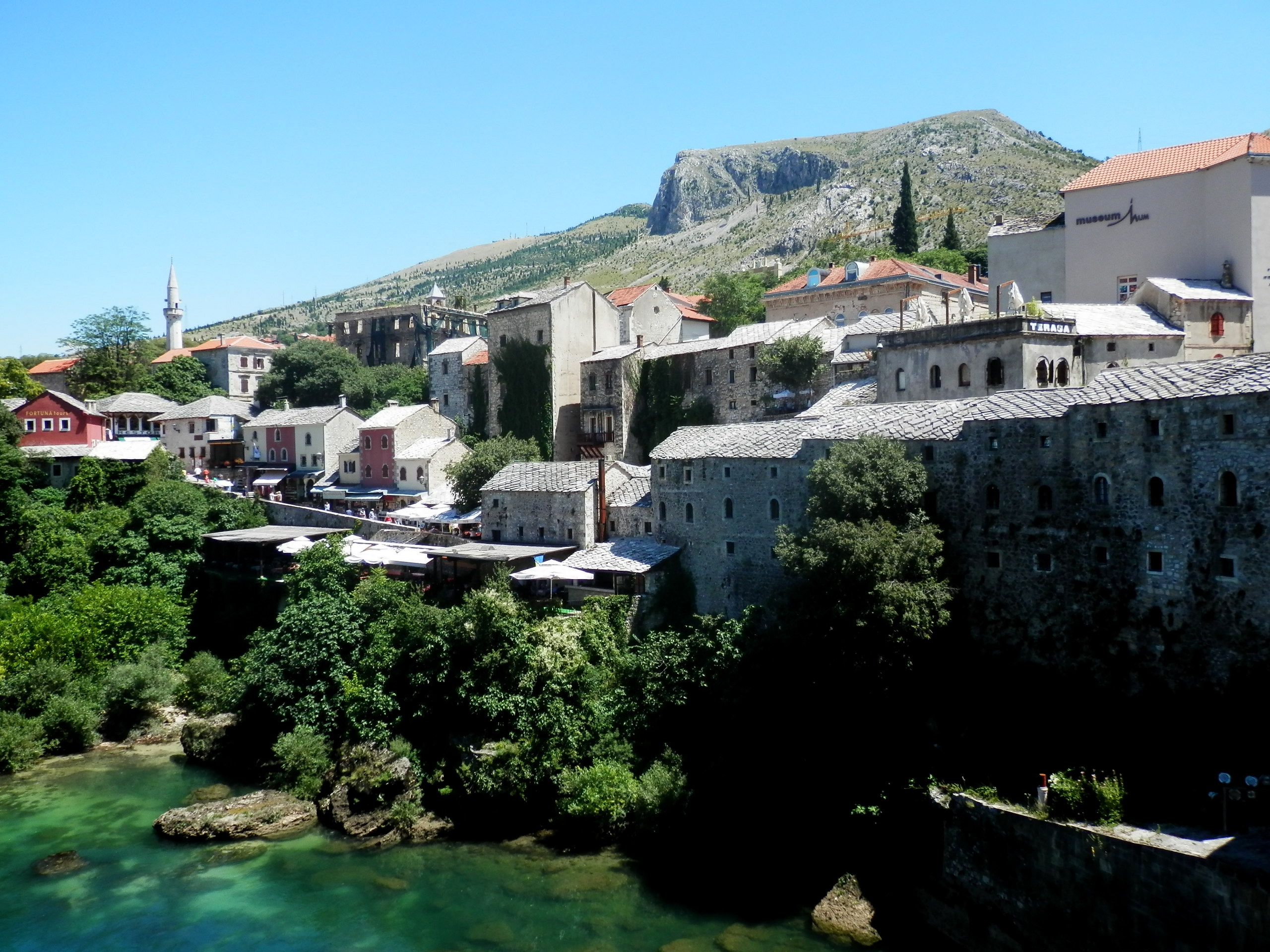 Bazár Kujundžiluk. Mesto Mostar,Bosna a Hercegovina.